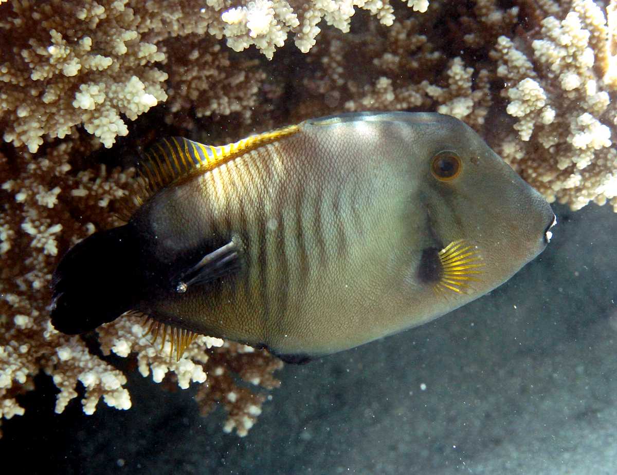 Un poisson-lime balai (Amanses scopas) à la Réunion.